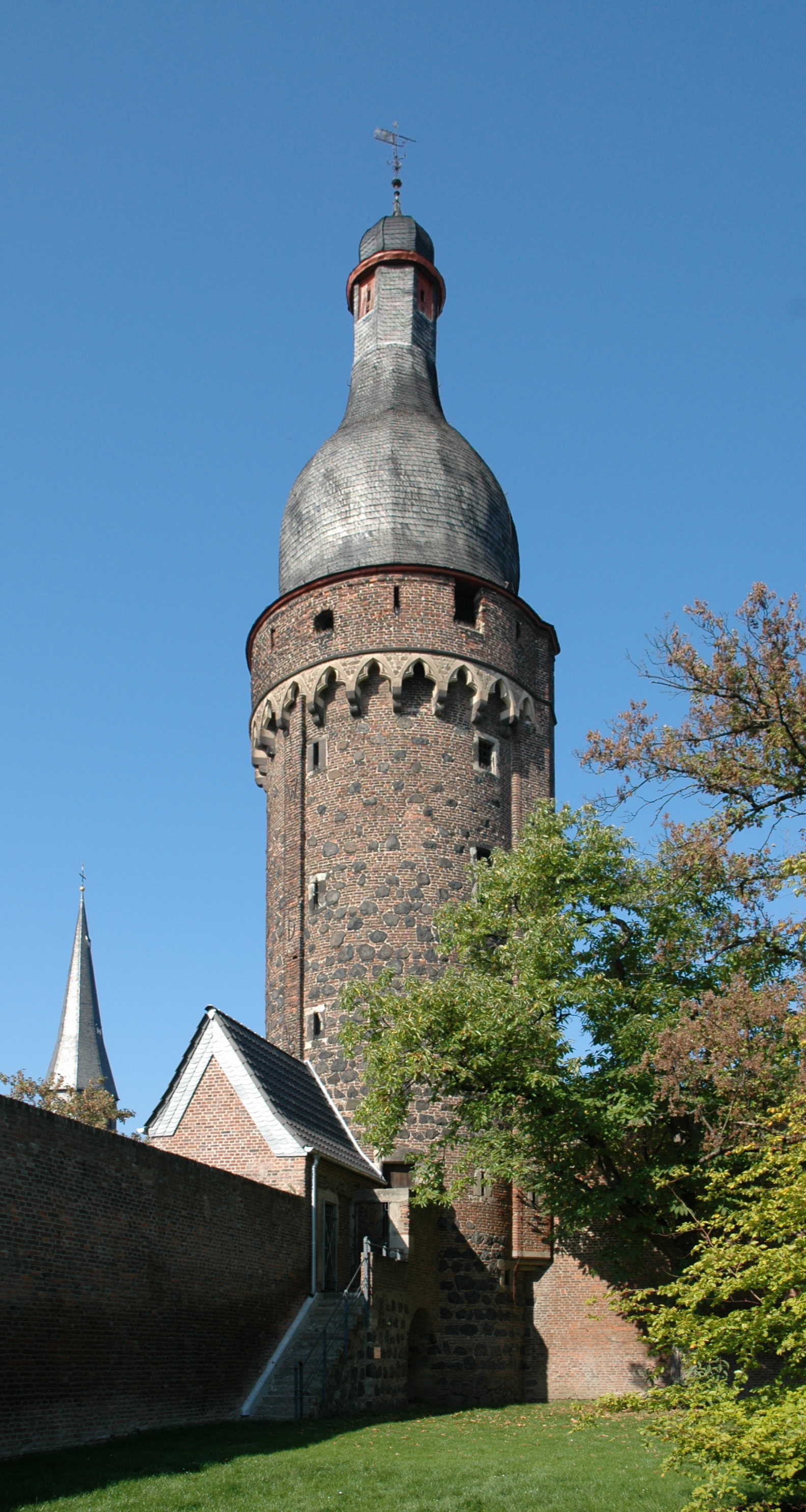 Burg Friedestrom in Dormagen-Zons, Südansicht des Juddeturms